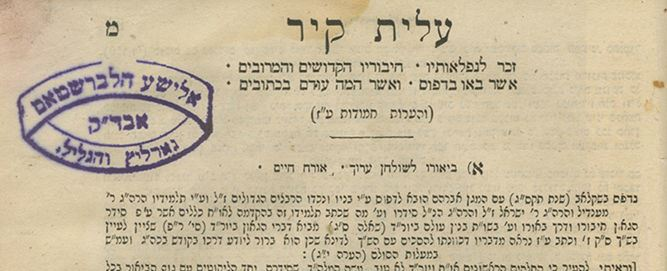 חותמת רבי אלישע הלברשטאם מגורליץ